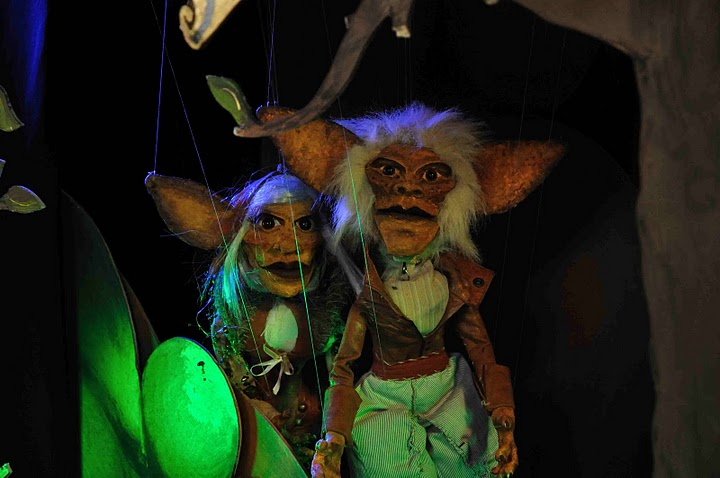 marionnettes à fils - korrigan - Cie. Coppelius